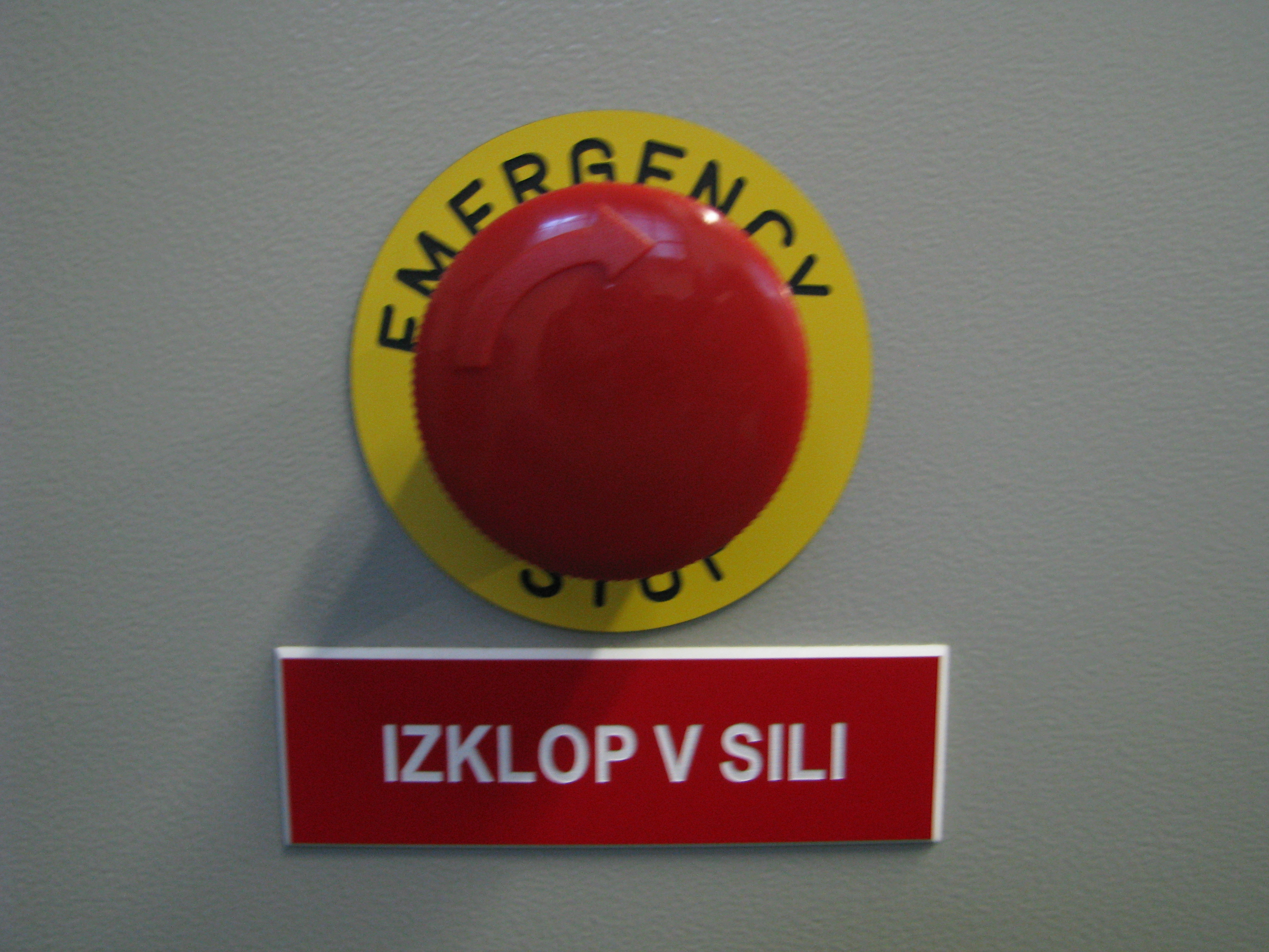 Stikalo za izklop v sili